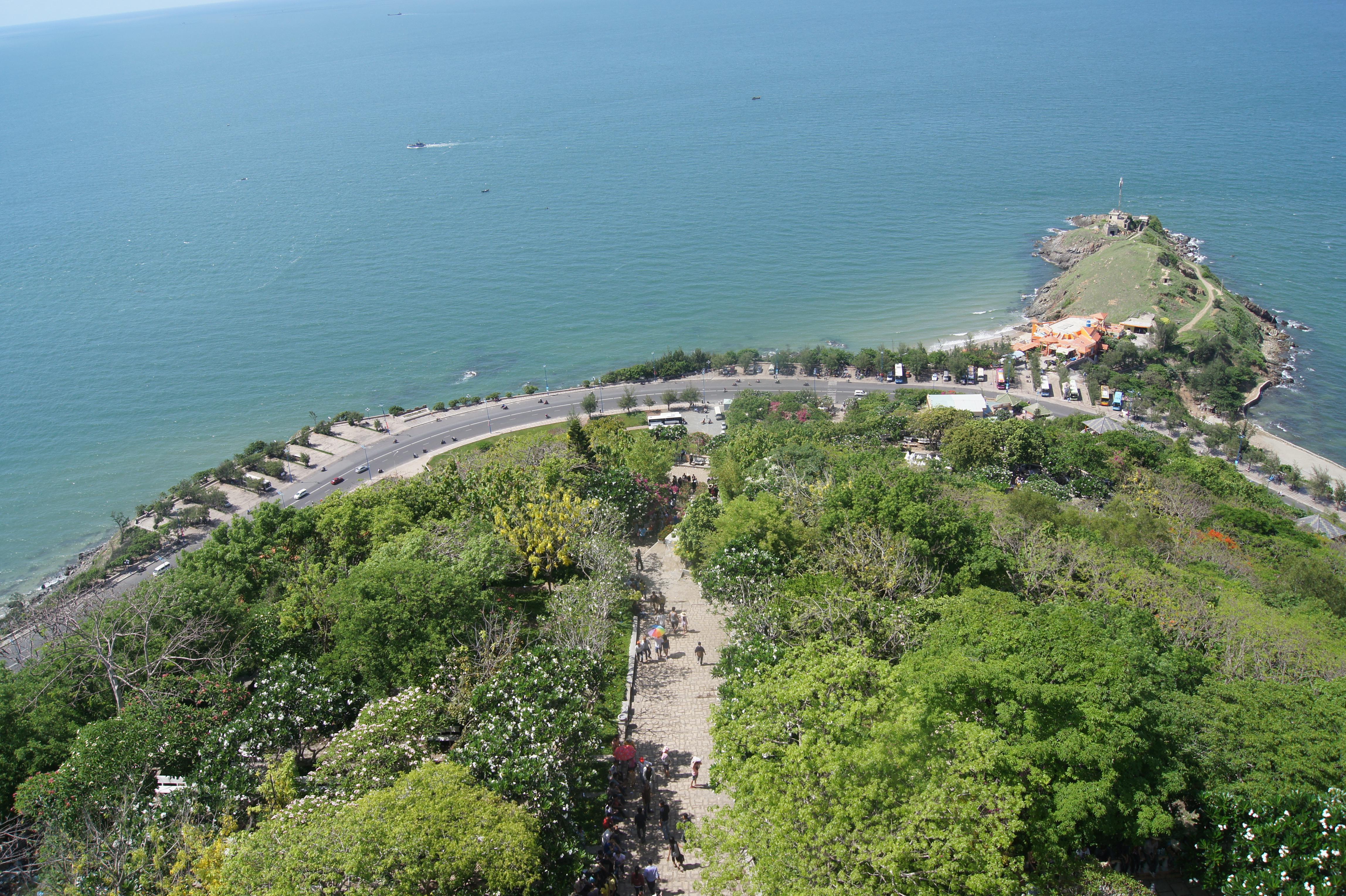 Mũi Nghinh Phong nhìn từ tượng Chúa Ki-tô